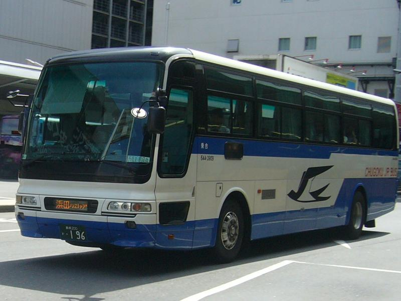 広島バスセンター(Hiroshima bus center)にて撮影 登録番号 島根200か・196 中国ジェイアールバス(Chugoku JR bus)浜田営業所所属 車番644-3909 いさりび号用 三菱ふそう・エアロバス KL-MS86MP